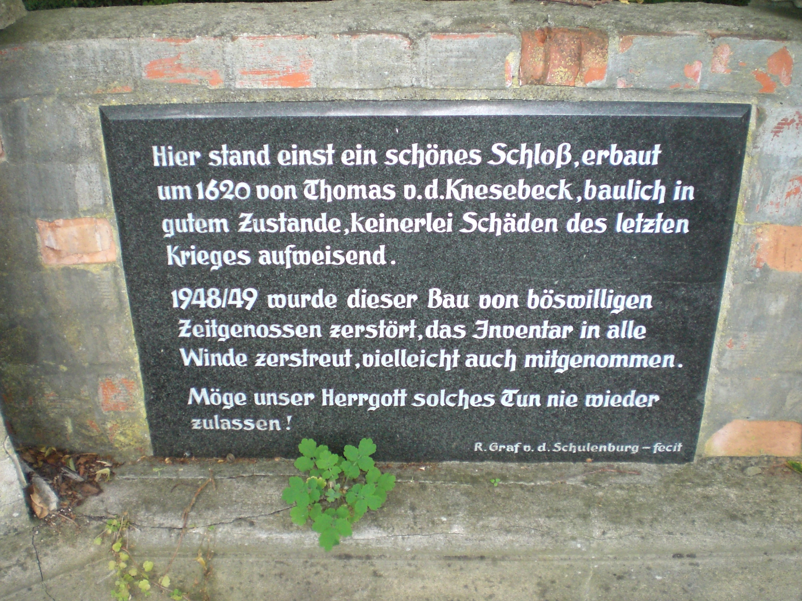 Gedenktafel am Neuen Schloss Tylsen, die auf die Zerstörung eingeht